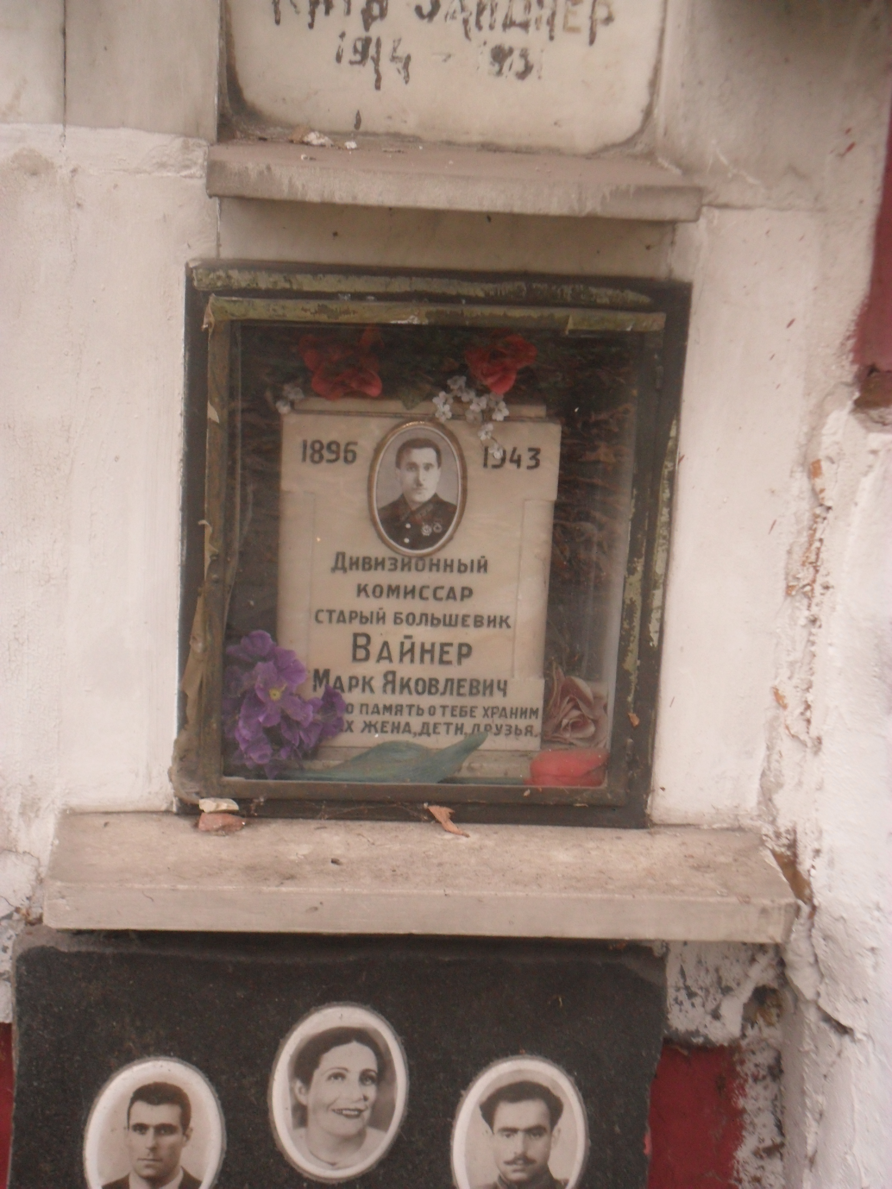 Плита колумбария дивизионного комиссара Марка Вайнера на Новодевичьем кладбище Москвы.